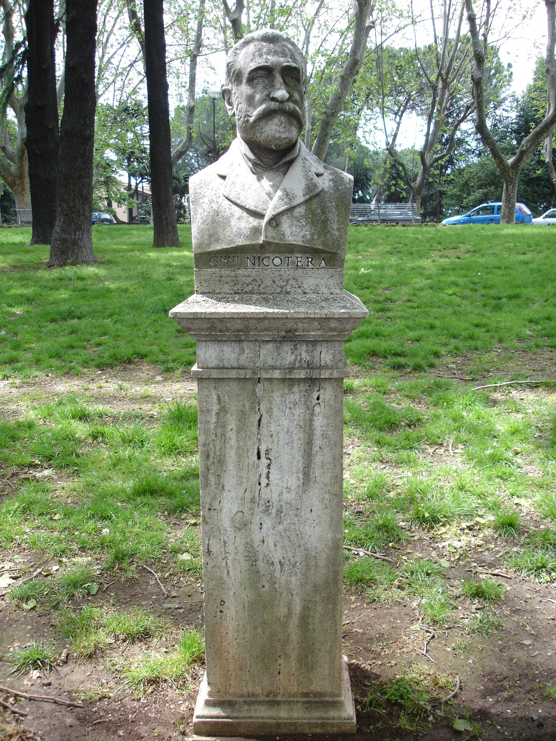 Busto di Giovanni Nicotera (Sambiase (Lamezia T.), Cz 1828 - Vico Equense, Na 1894), uomo politico e patriota. Foto fatta da me F. Fullone al Gianicolo. Original uploader was Fullo88 at it.wikipedia